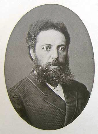 Филатов, Нил Фёдорович